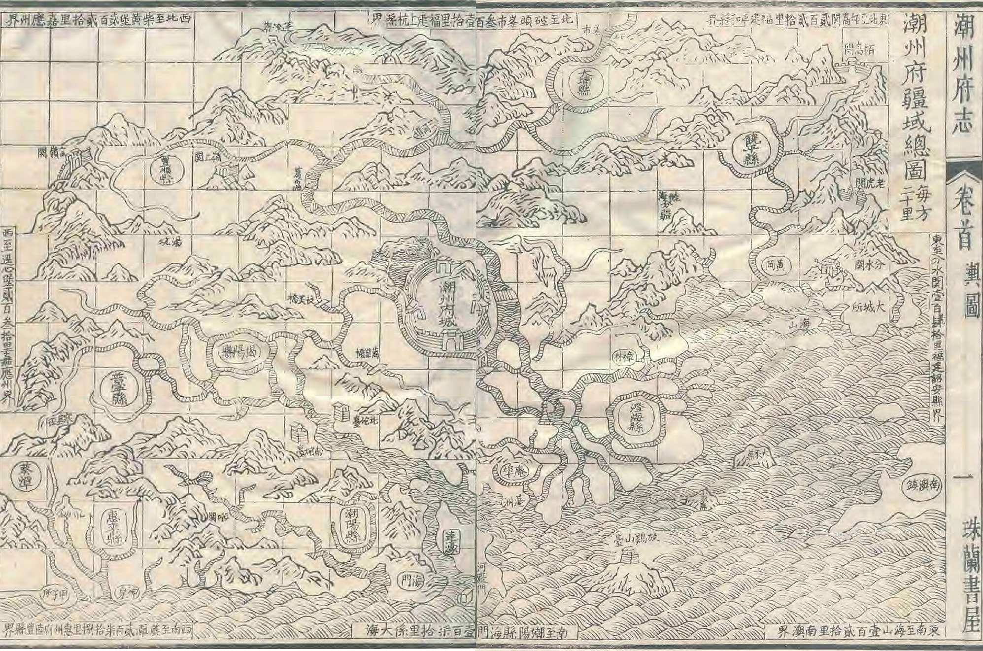 乾隆《潮州府志》 潮州府疆域总图